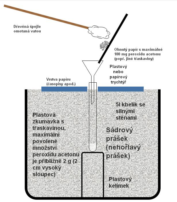 Plnění rozbušky